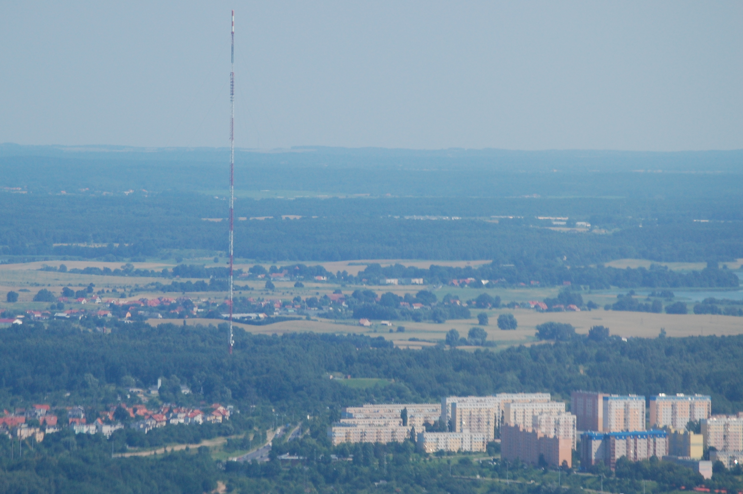 RTCN Pieczewo